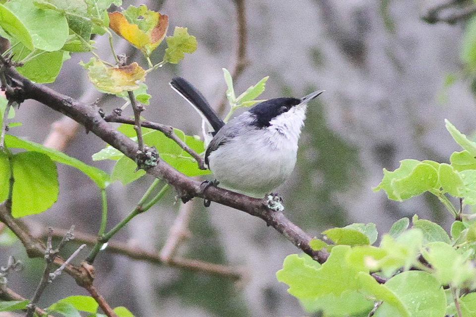 Tatacoa Desert